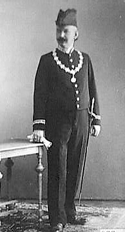 P. Hoytema van Konijnenburg (1868-1921), burgemeester van Naarden, in ambtskostuum